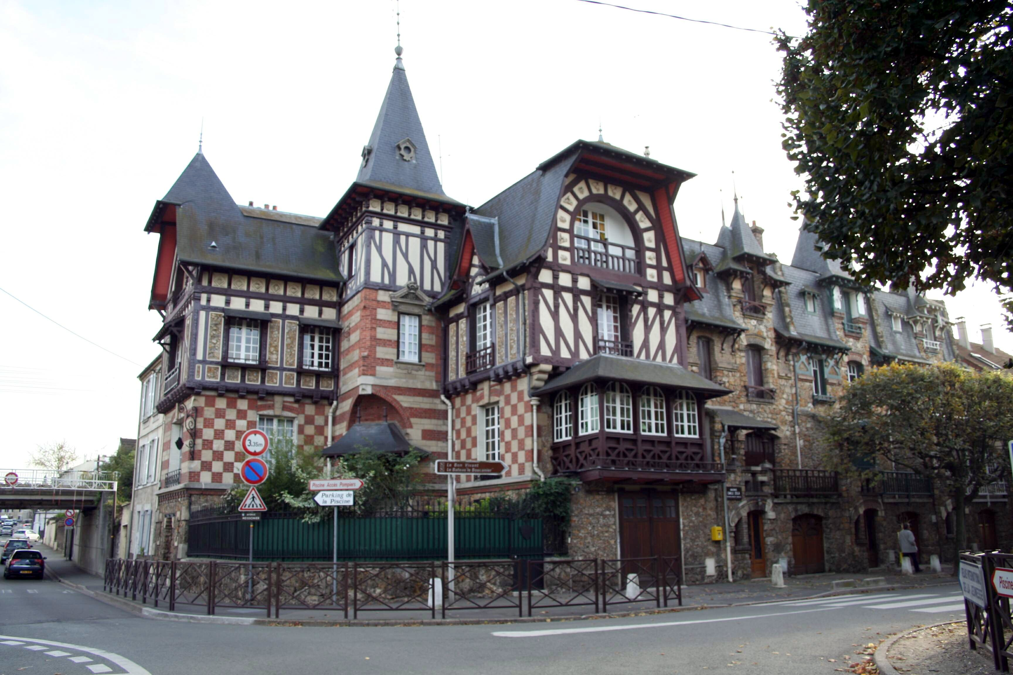 Maison-atelier de Théophile Bourgeois (1858-1930), architecte français, à Poissy - Yvelines (France)